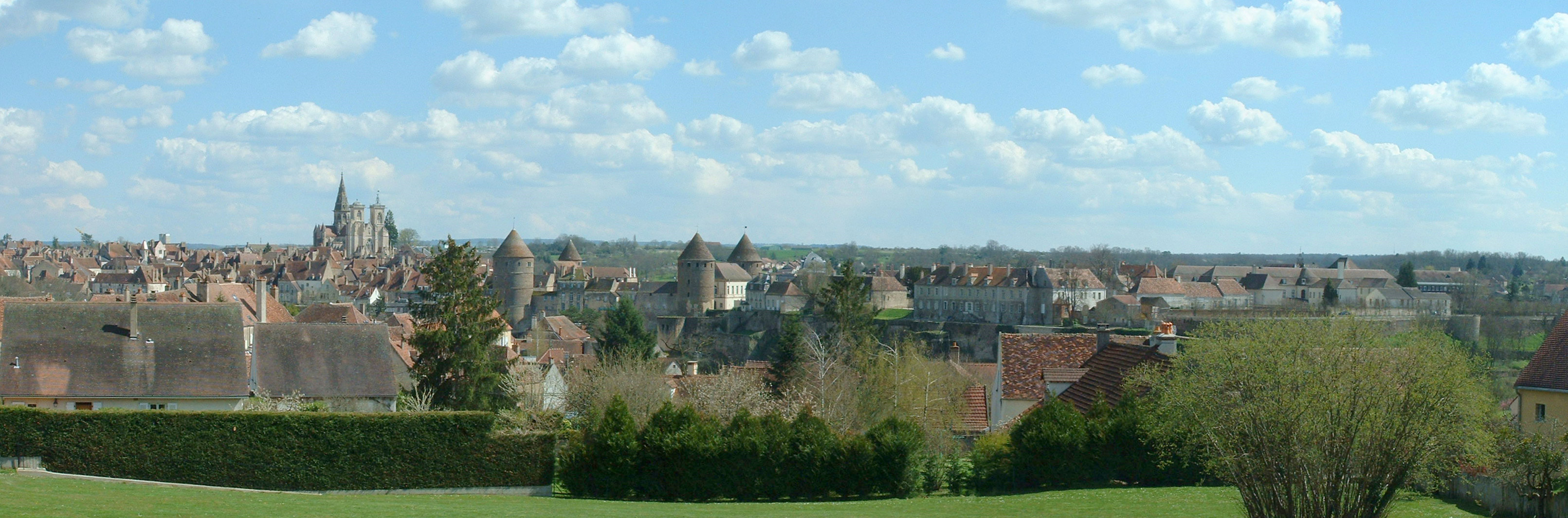 Semur-en-Auxois (21) - la vieille ville